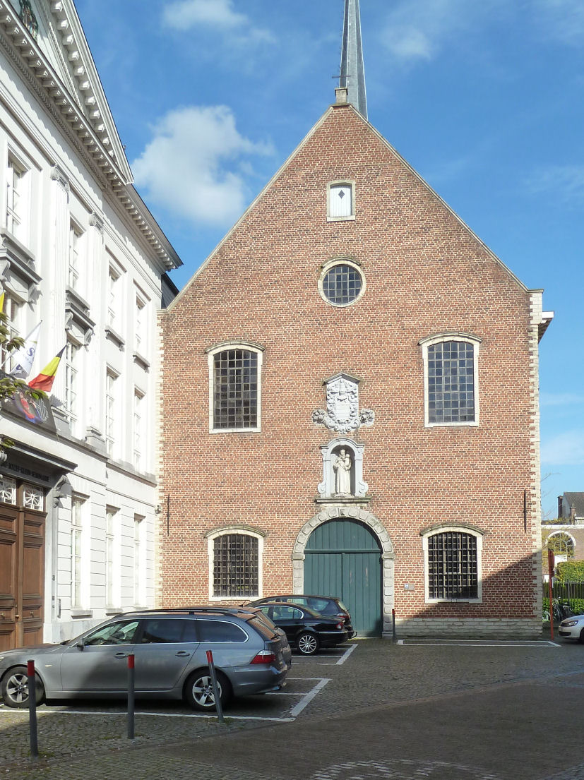 Sint-Jozef-Klein-Seminarie (Saint Joseph Minor Seminary) in Sint-Niklaas. Sint-Niklaas, East Flanders, Belgium